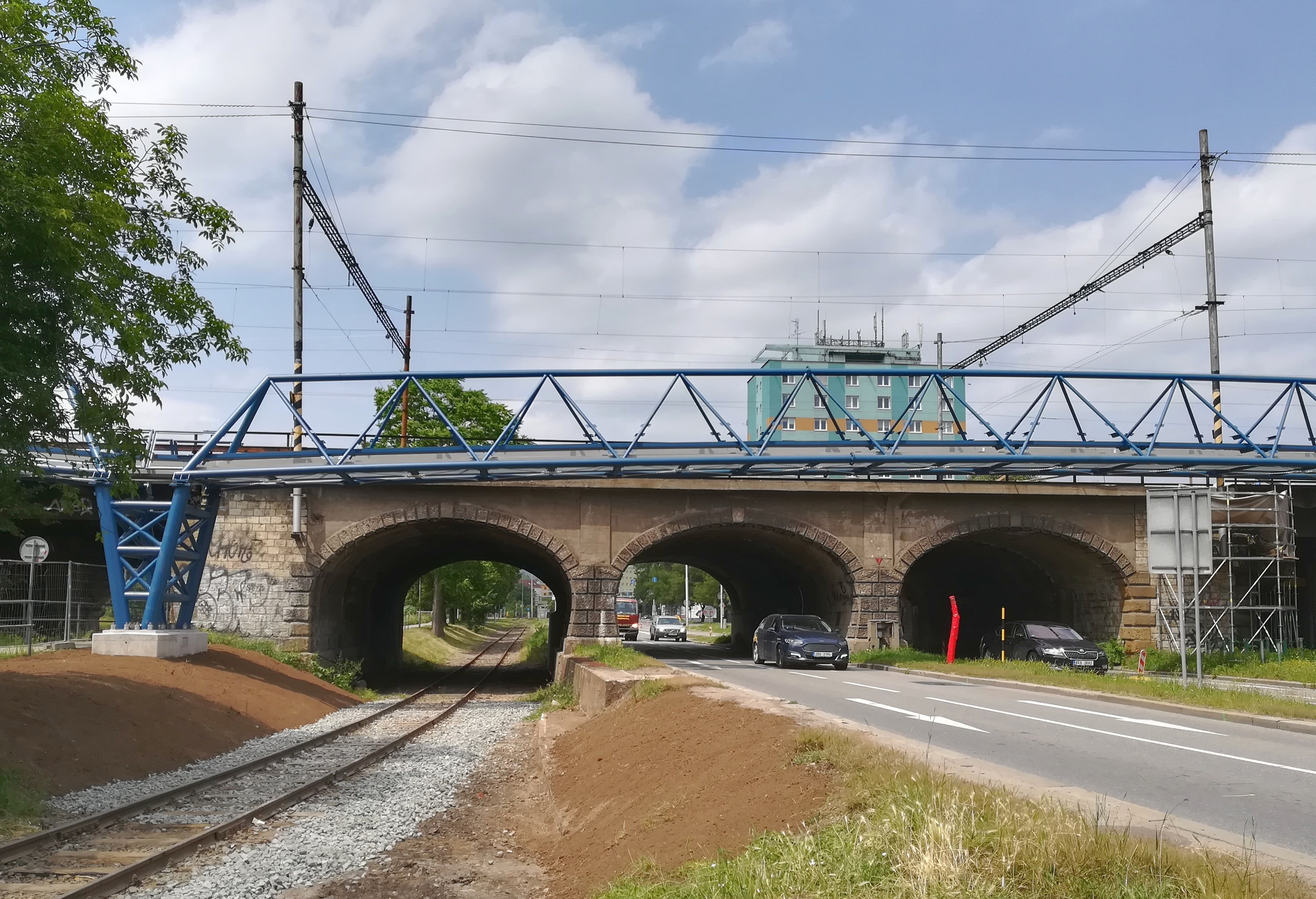 Brno - Vídeňský viadukt, kabelová lávka z roku 2019.